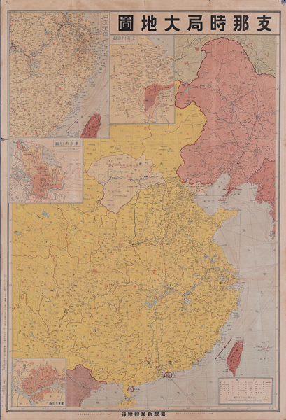 1937 China Map 1937年支那時局大地圖